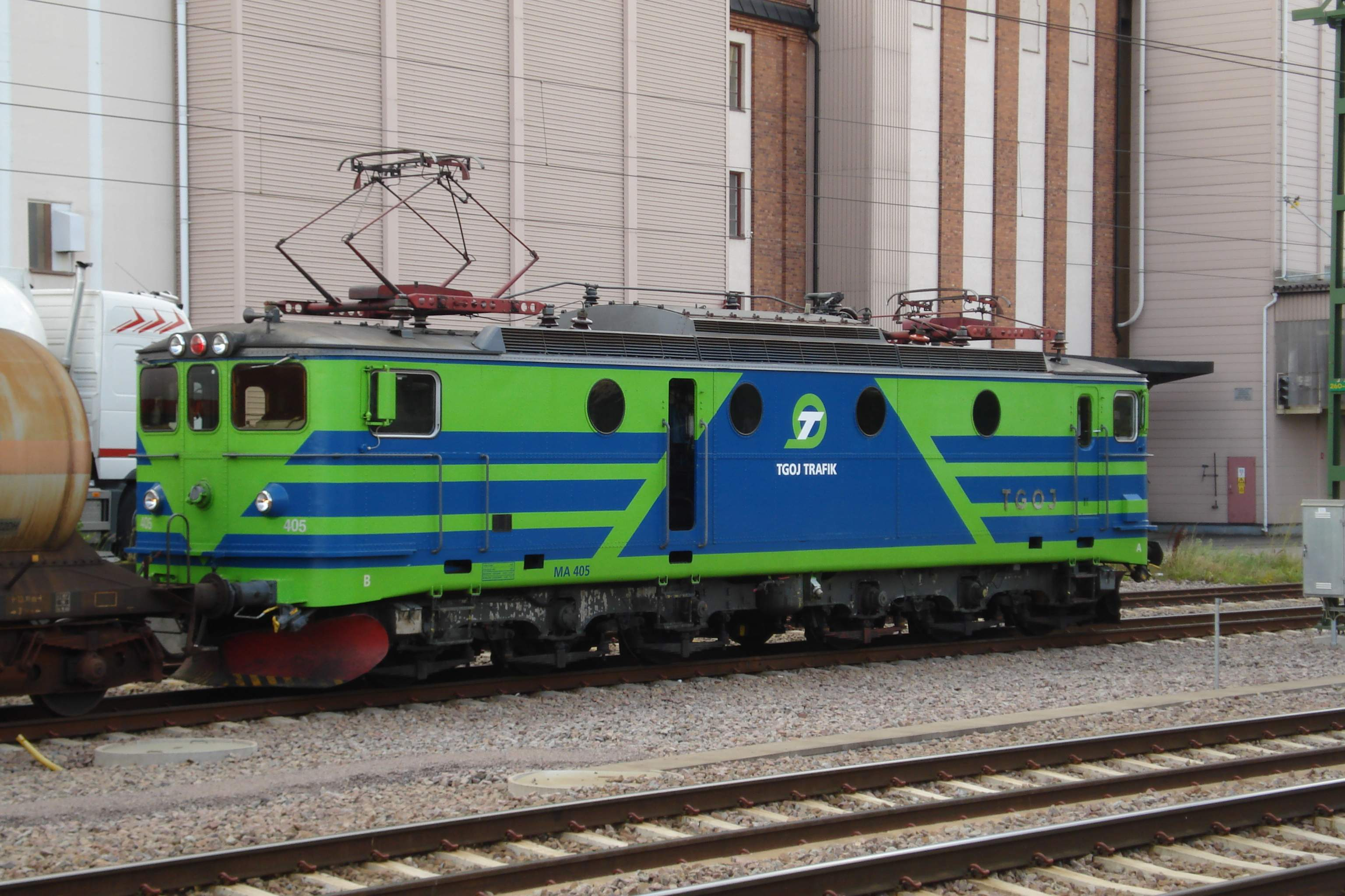 Ma 405 i Mjölby som drar kopparpendeln.